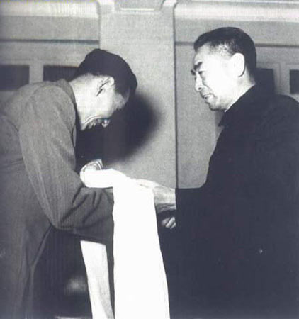 1950年代，阿沛向周总理敬献哈达。